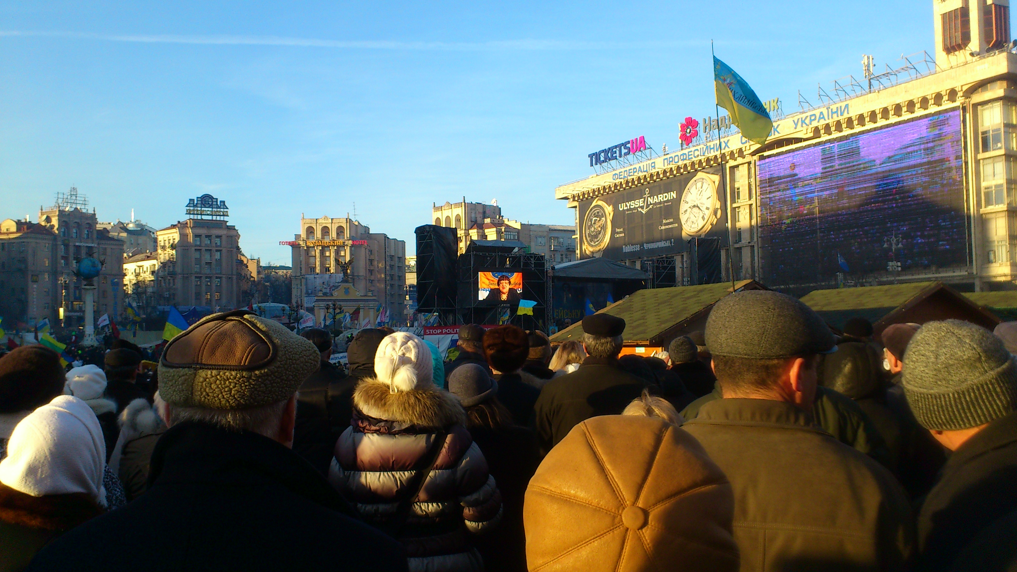 Відеозвернення Новодворської до Євромайдану